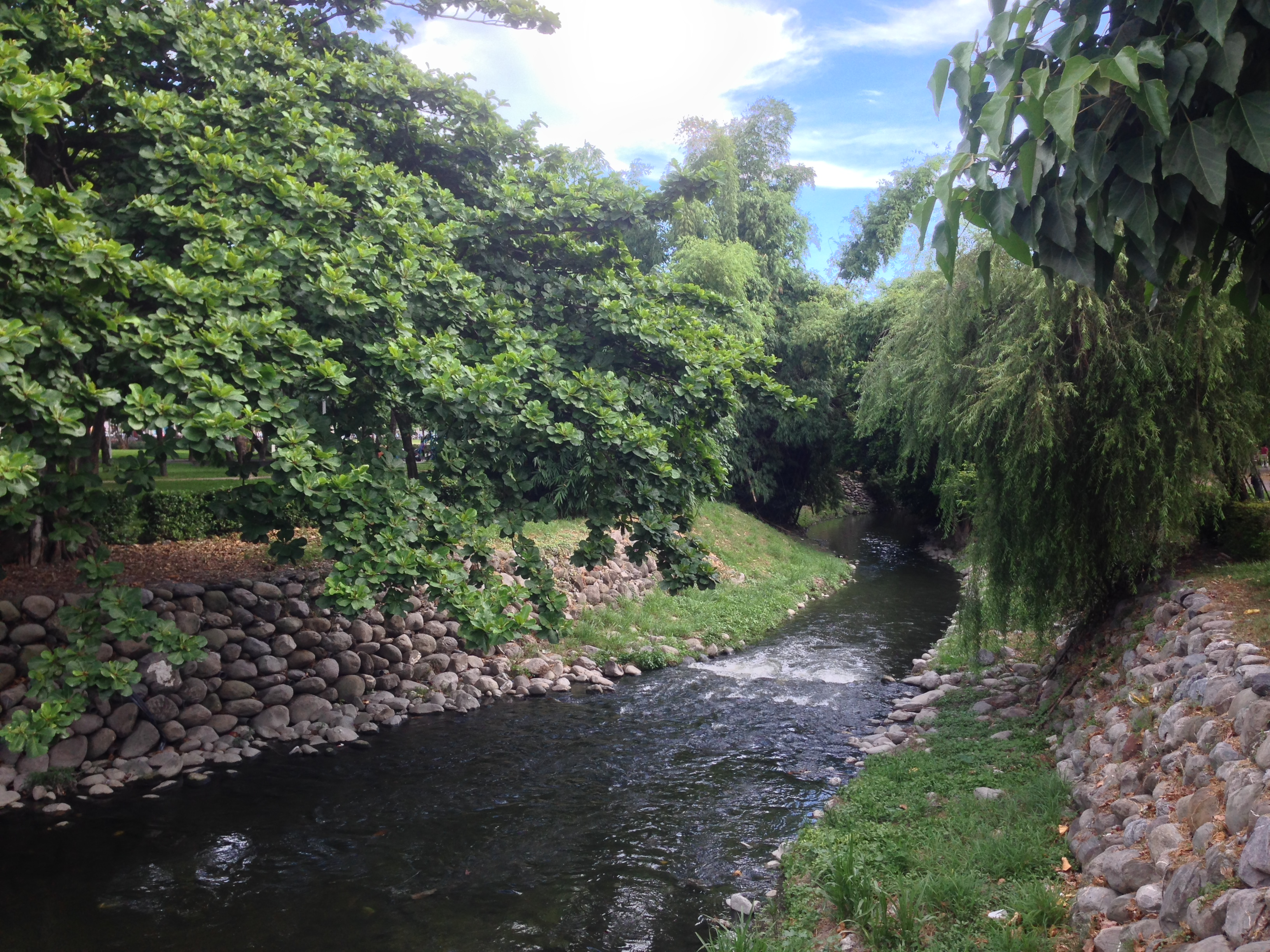 中文（台灣）: 流經屏東市千禧公園的萬年溪。